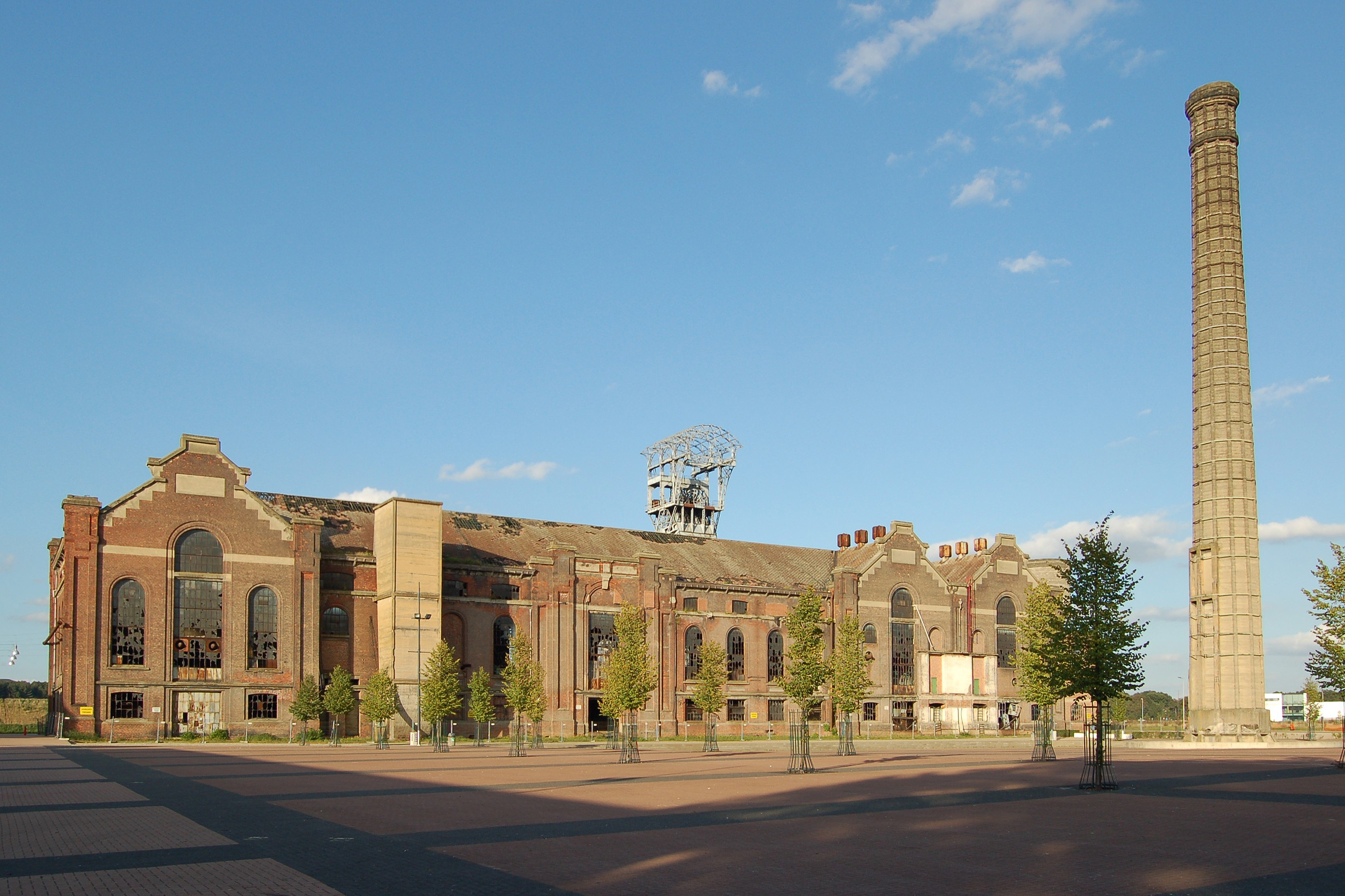 Steenkoolmijn, ophaalmachinegebouw, Limburg, Heusden-Zolder